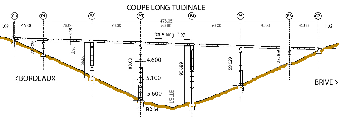 A89 - Viaduc de l'Elle - Coupe longitudinale